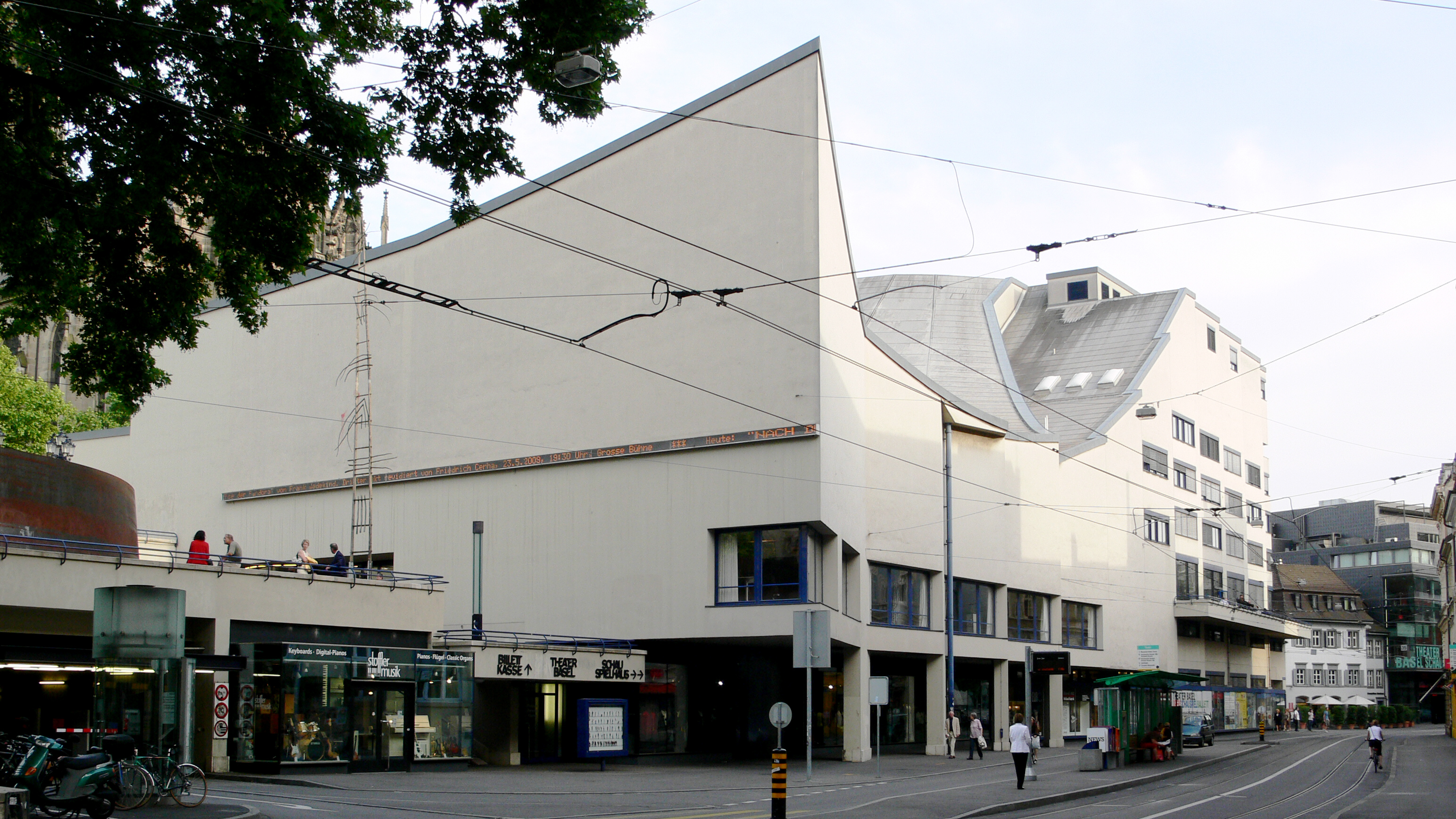 Theater Basel, Steinentorstrasse